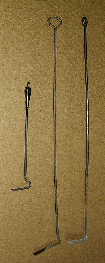 Suured ja väike ahjuroop.